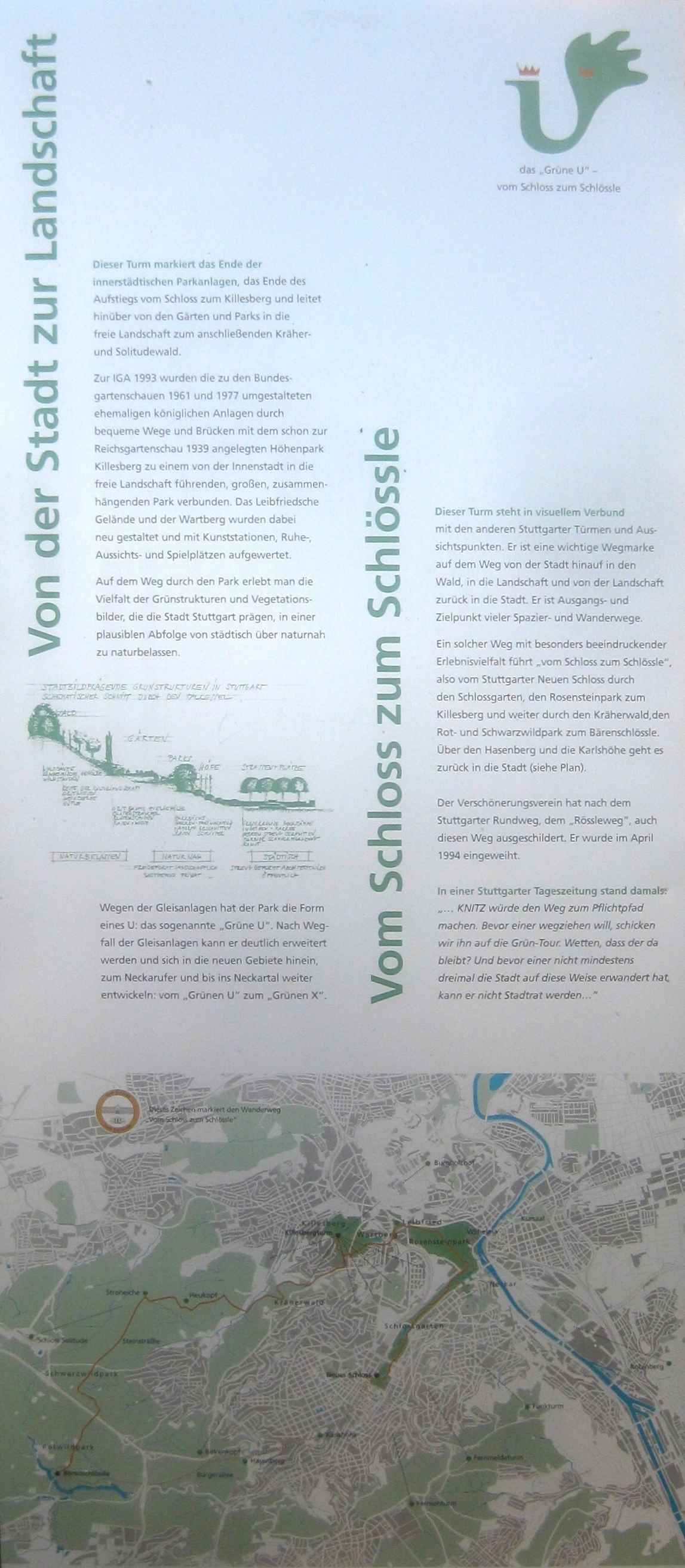 Killesbergturms, Stuttgart, Höhenpark Killesberg. – Infotafel: Von der Stadt zur Landschaft. Vom Schloss zum Schlössle.